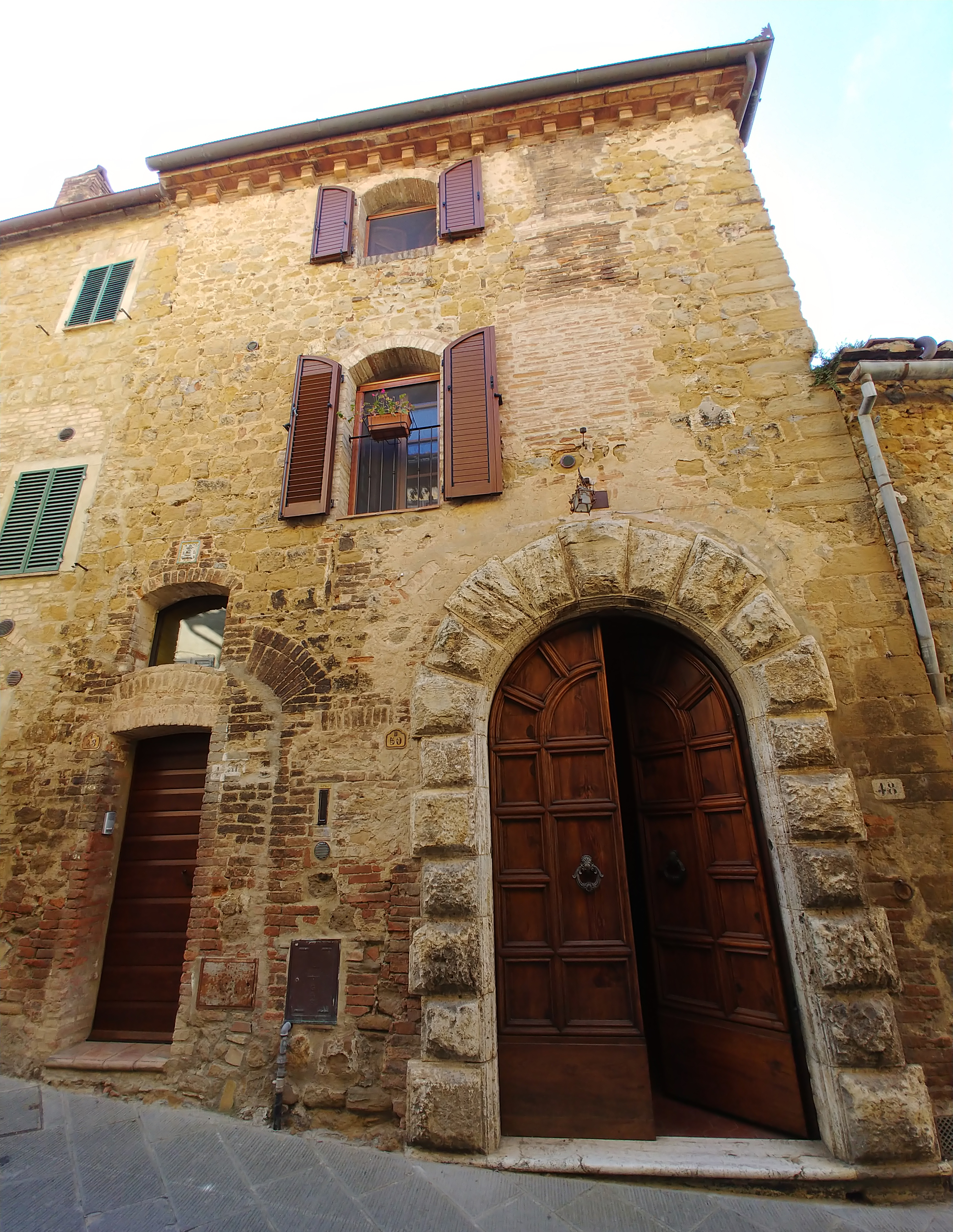 Facciata.